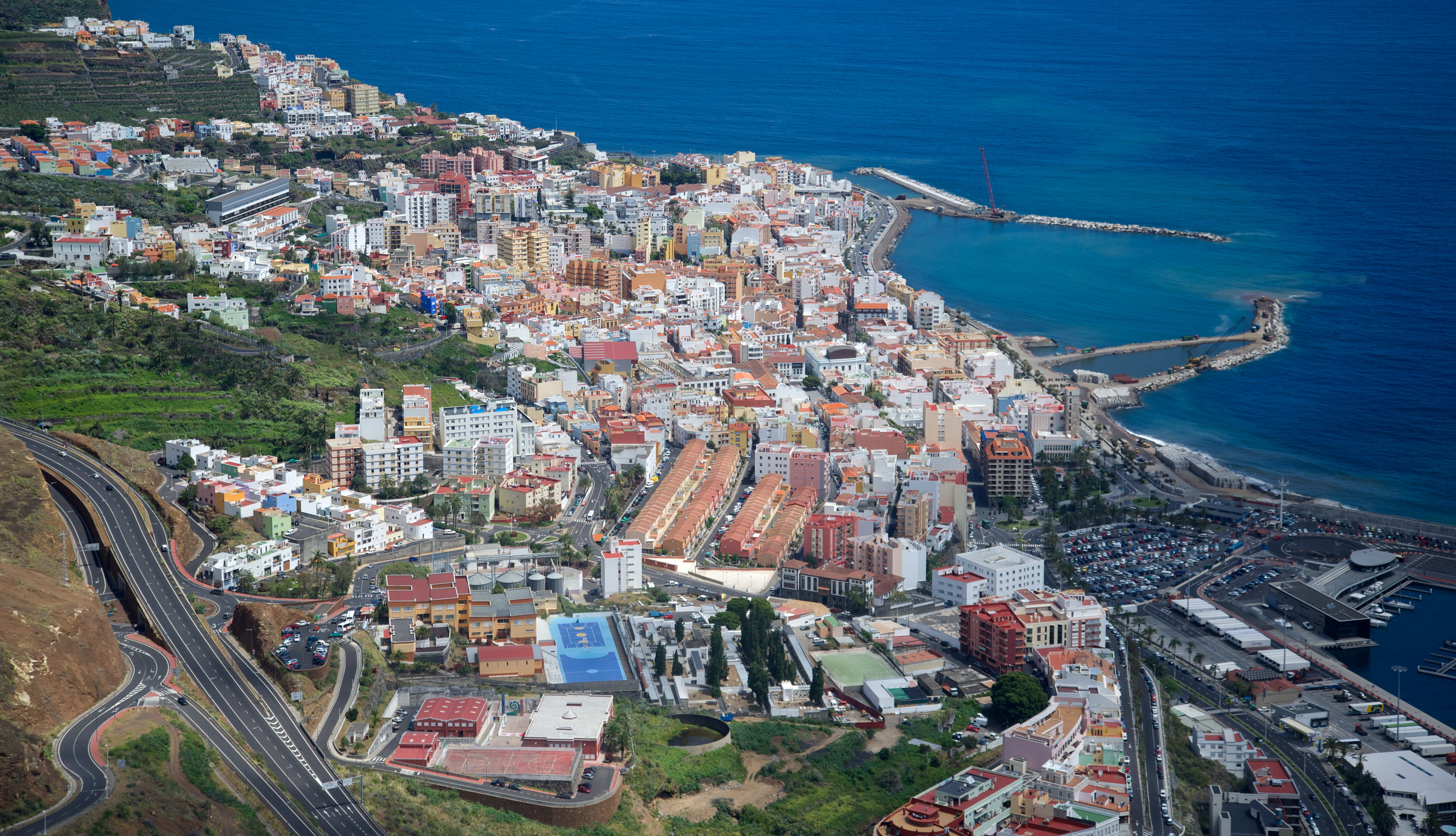 Blick auf Santa Cruz de la Palma